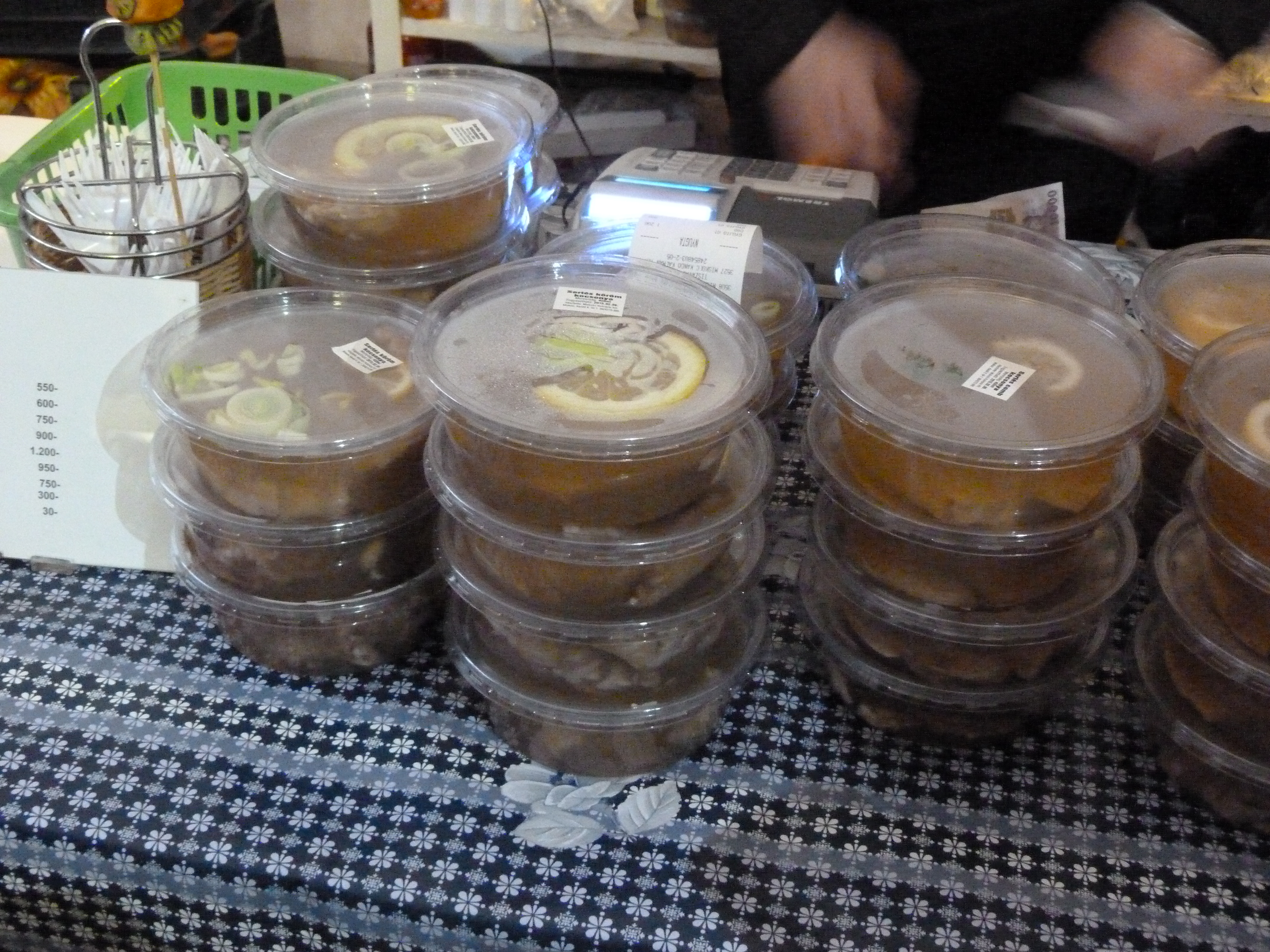 A felvétel 2015. február 7-én szombaton készült Miskolcon. Miskolci Kocsonyafesztivál. ©© Derzsi Elekes Andor, Budapest, 2015, Published in the Metapolisz DVD line. You are authorised to use this vid under Creative Commons – even for commercial, for profit purposes. The vid must be attributed to Derzsi Elekes Andor. All of the photos and vids in the Metapolisz DVD line are under Creative Commons and can be used even for commercial – for profit – purposes. Recommended Citation Derzsi Elekes Andor: Metapolisz DVD line